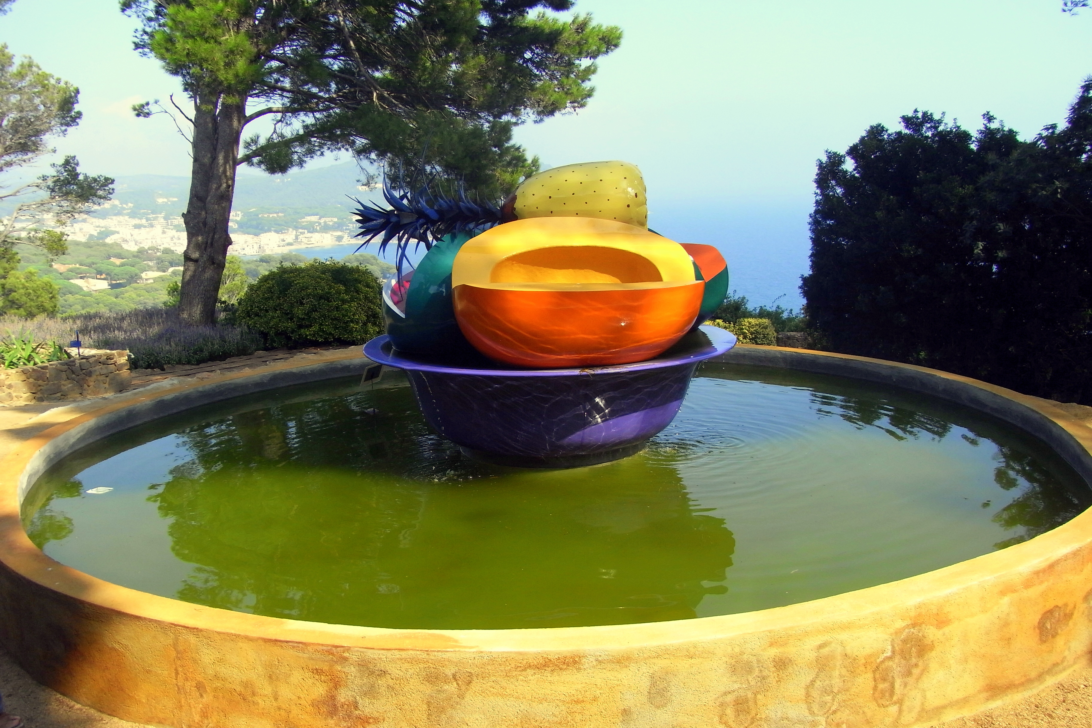 CALELLA de PALAFRUGELL - Jardí de Cap Roig. "PLATÓN" 2009 Ana mercedes Hoyos Fibra de polièster policromat 160 x 220 x 220 cm